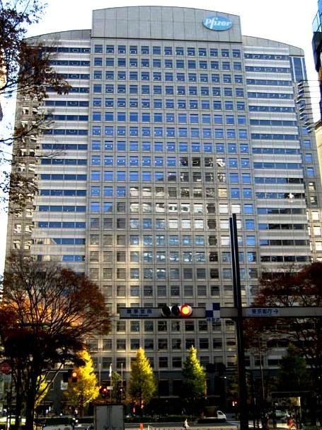 Shinjuku Bunka Quint Building 新宿文化クイントビル Shinjuku, Tokyo